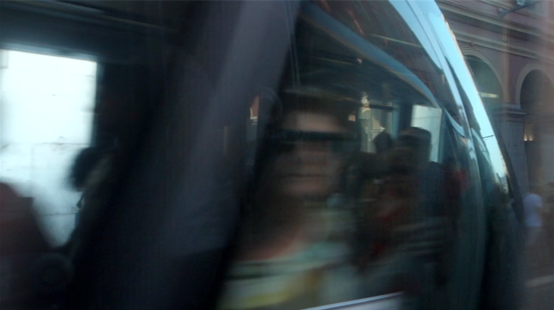 Photogramme extrait de la vidéo.